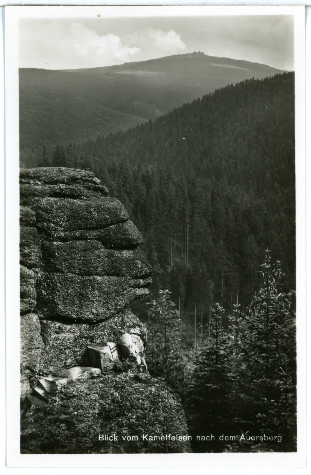 Auersberg; Blick vom Kamelfelsen nach dem Auersberg This postcard is from publisher Brück & Sohn in Meißen ( postcard has a unique number 25646 and is available in a higher resolution at the publisher. This images was uploaded in a cooperation project between Wikipedians and the publisher.